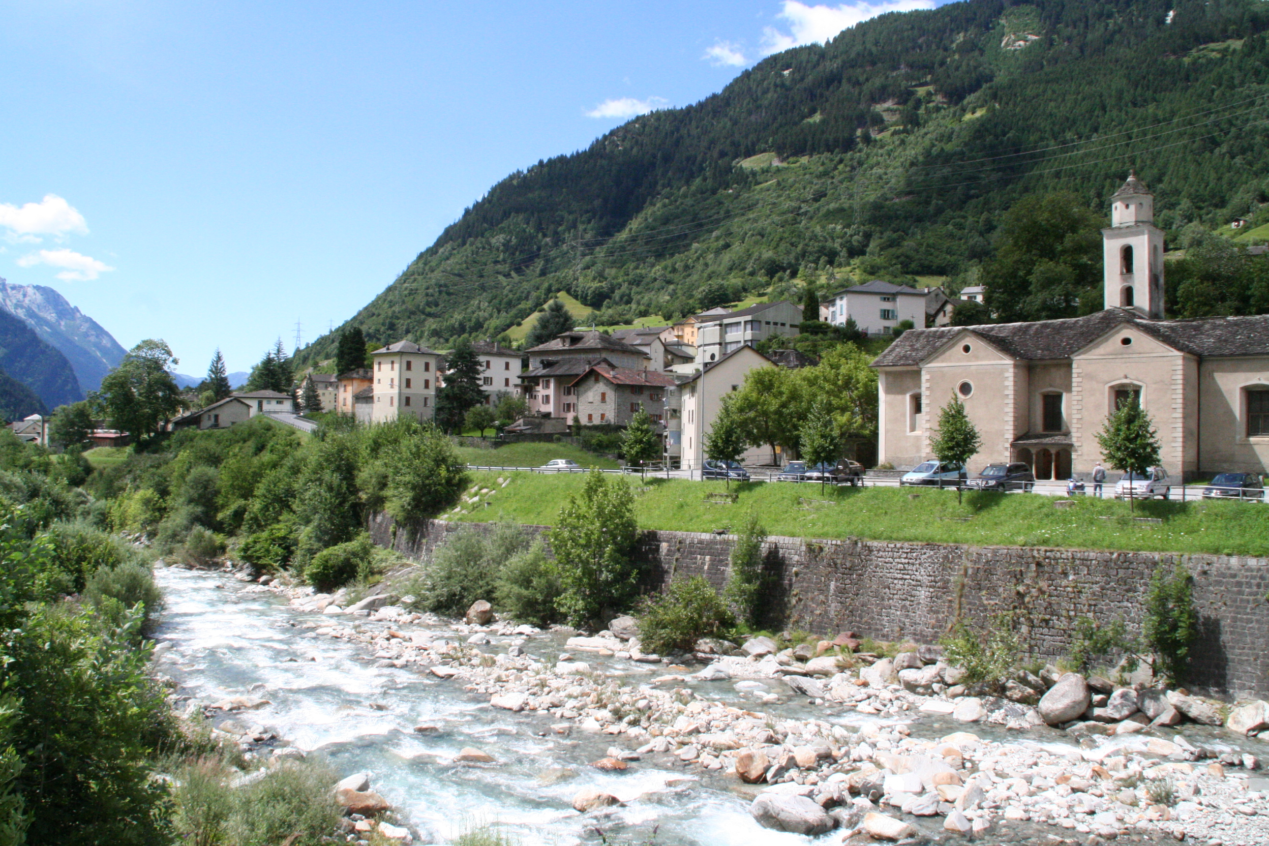 Mesocco nach Süden